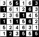 SoluÃ§Ã£o de um hitori criado por mim.